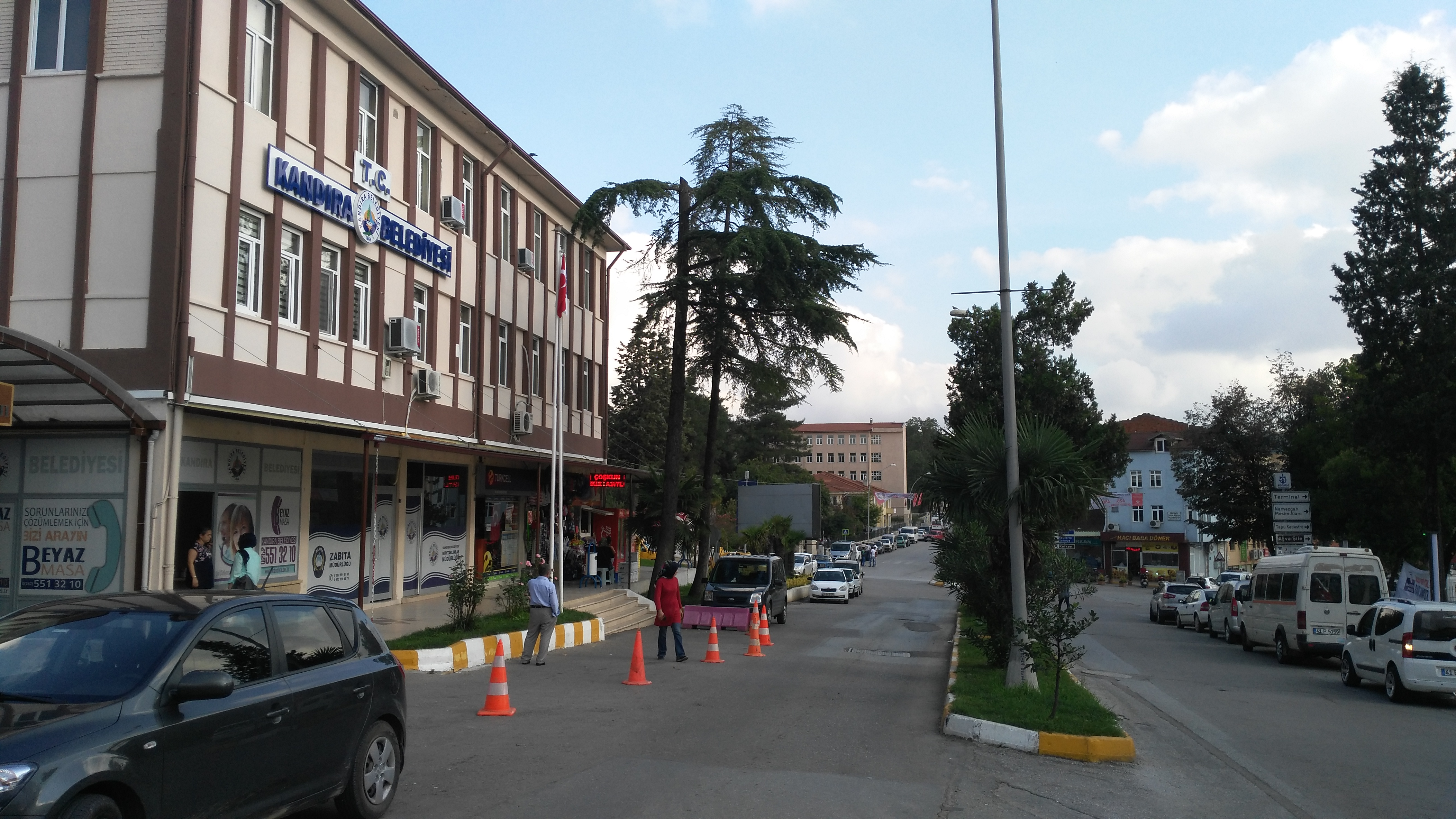 Kandıra merkez, belediye binası